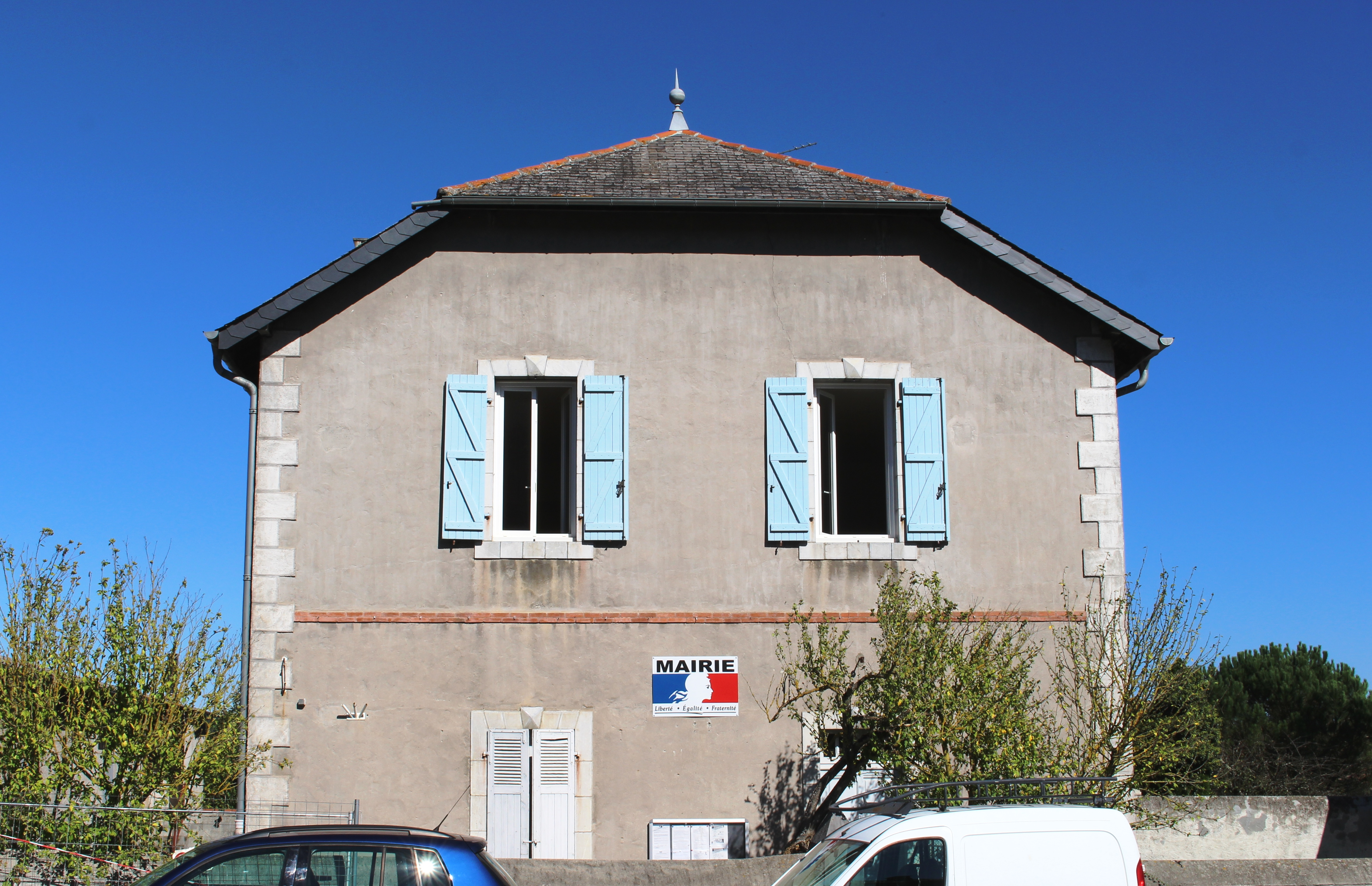 Mairie de Montégut (Hautes-Pyrénées)